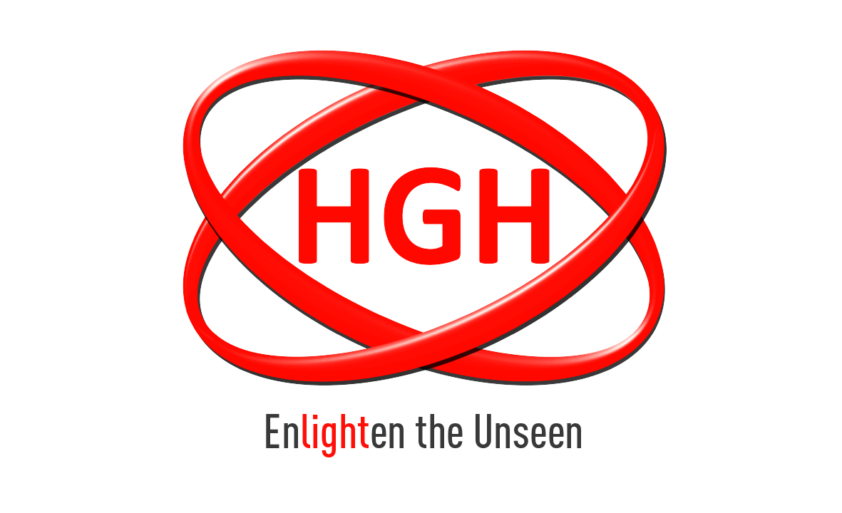 HGH Logo with its tagline revealed in 2020